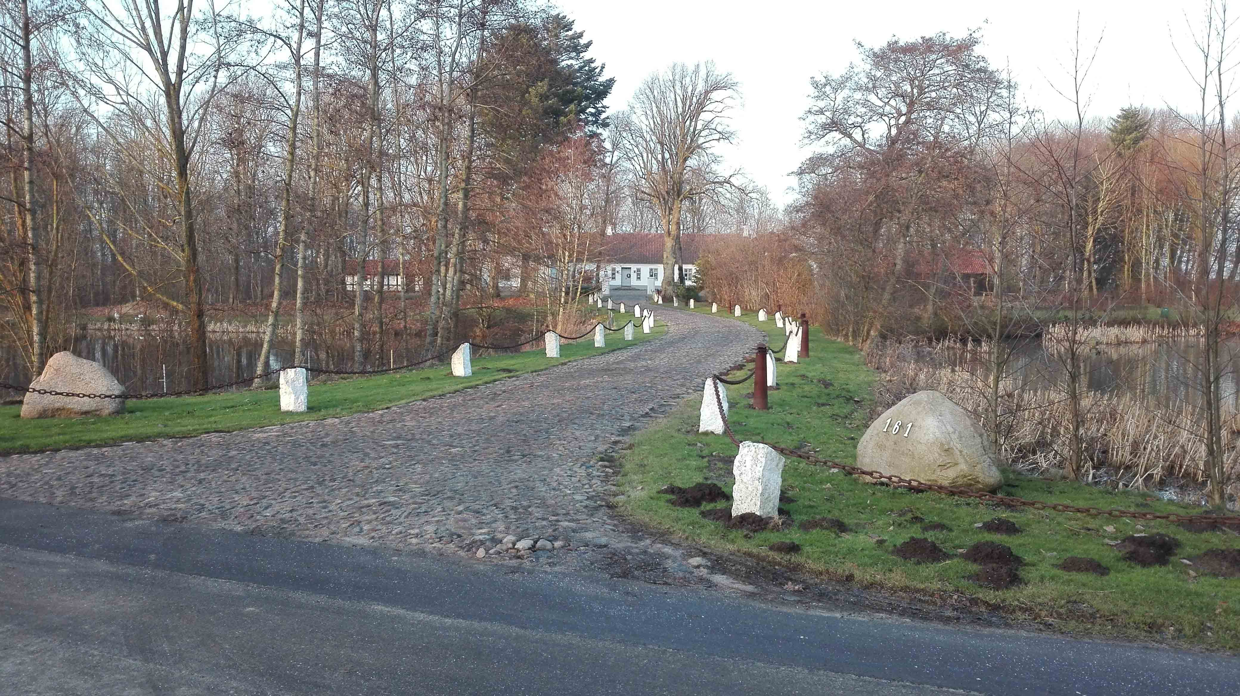 Fuglsig fra syd